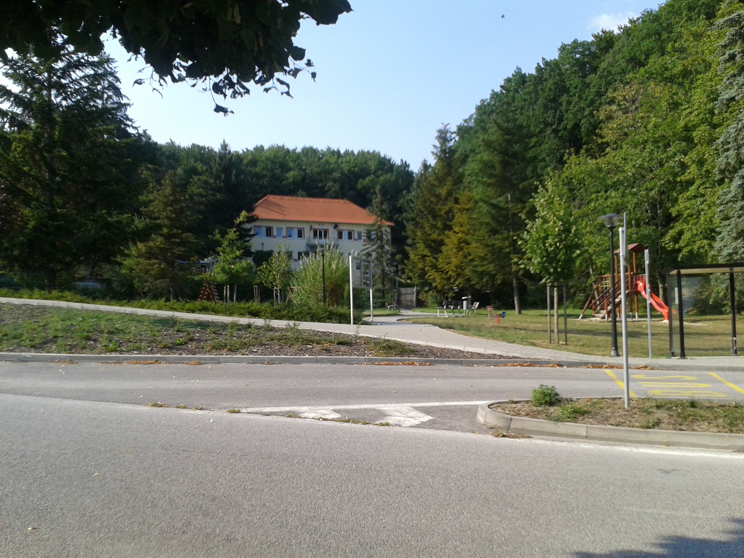 Námestie v Rudníku